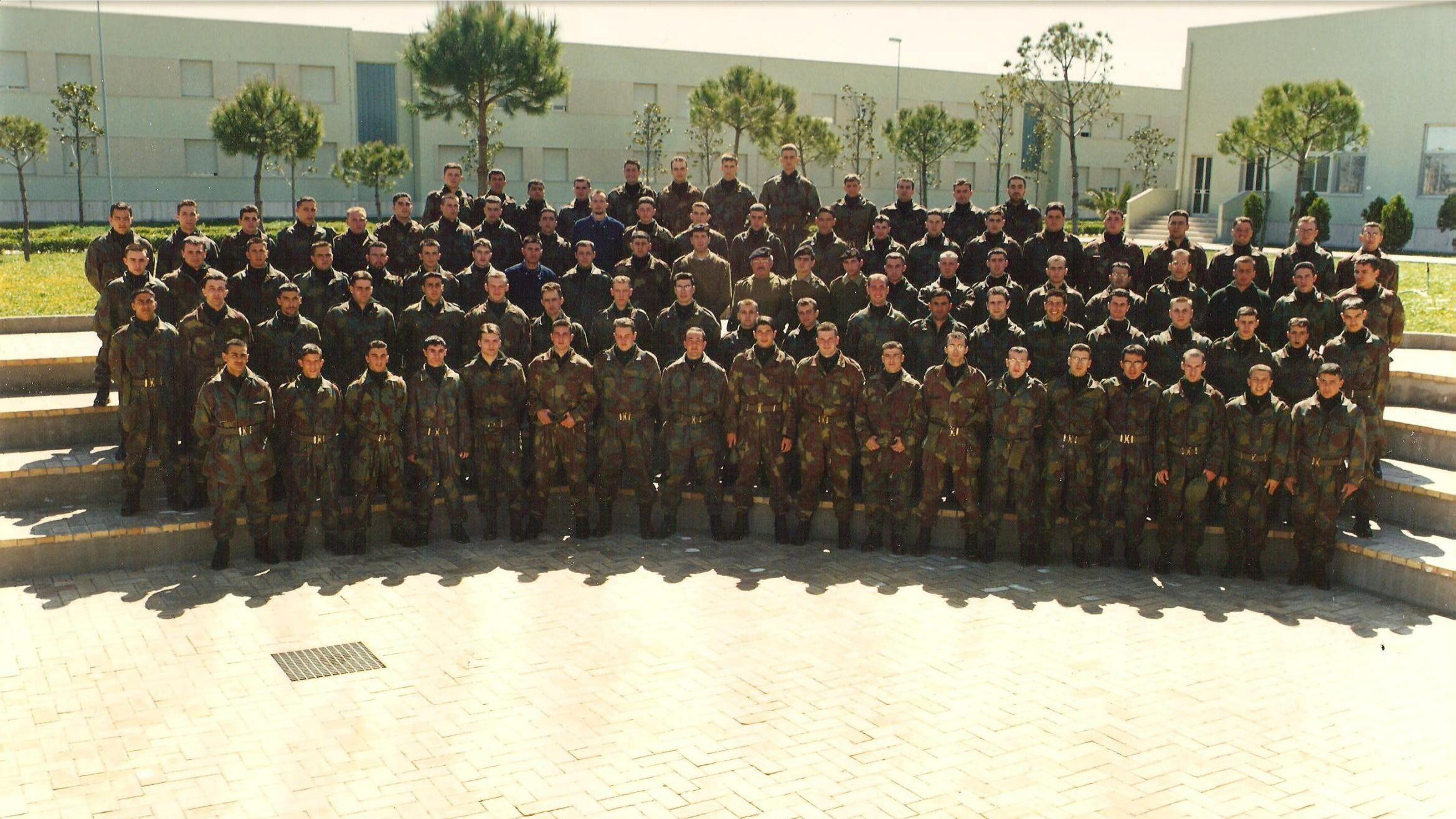 Allievi FCM/SDI (Servizio difesa istallazioni) della Marina Militare, 3° scaglione 1995, 1ª compagnia "La Spezia"